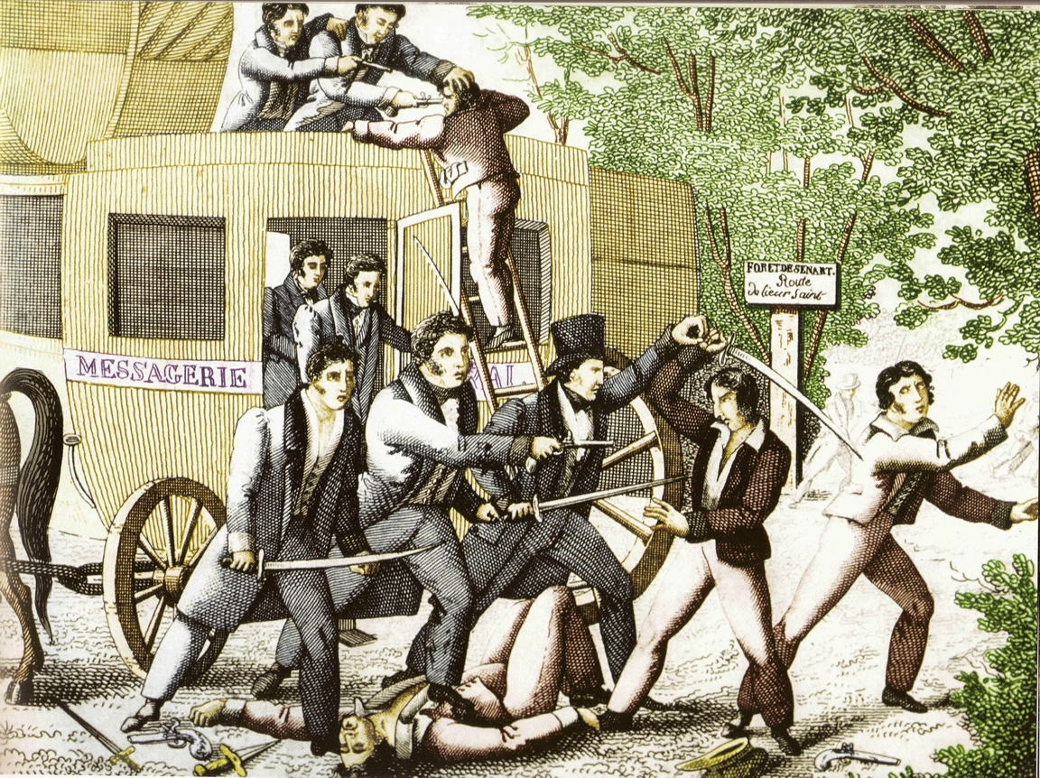 « Vidocq arrête des brigands qui attaquaient la diligence, dans la forêt de Sénart. »